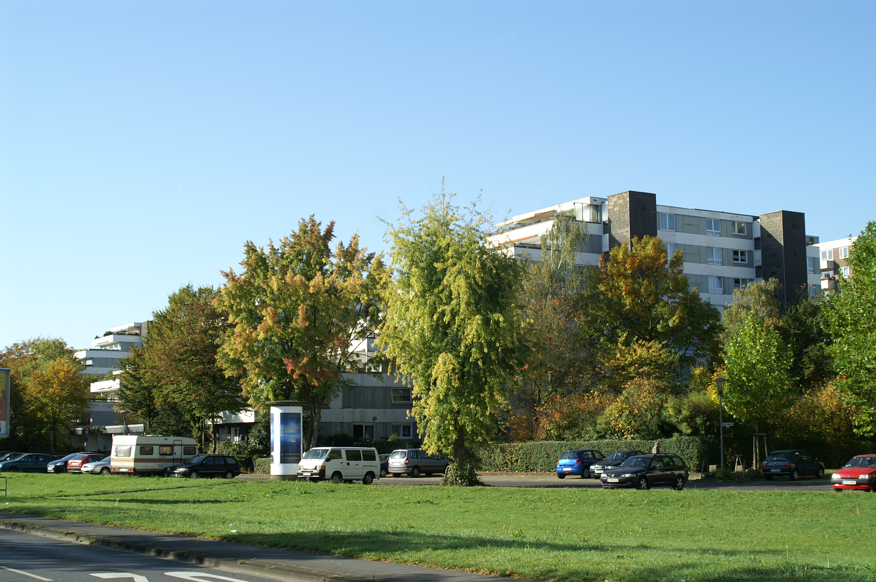 Grünstreifen am Neubrücker Ring in Köln-Neubrück